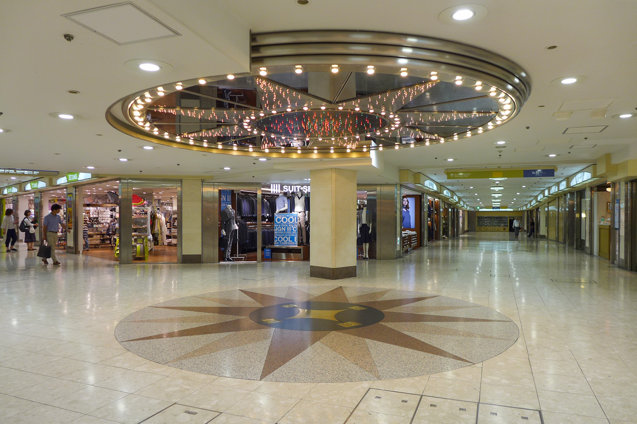 名駅地下街サンロード